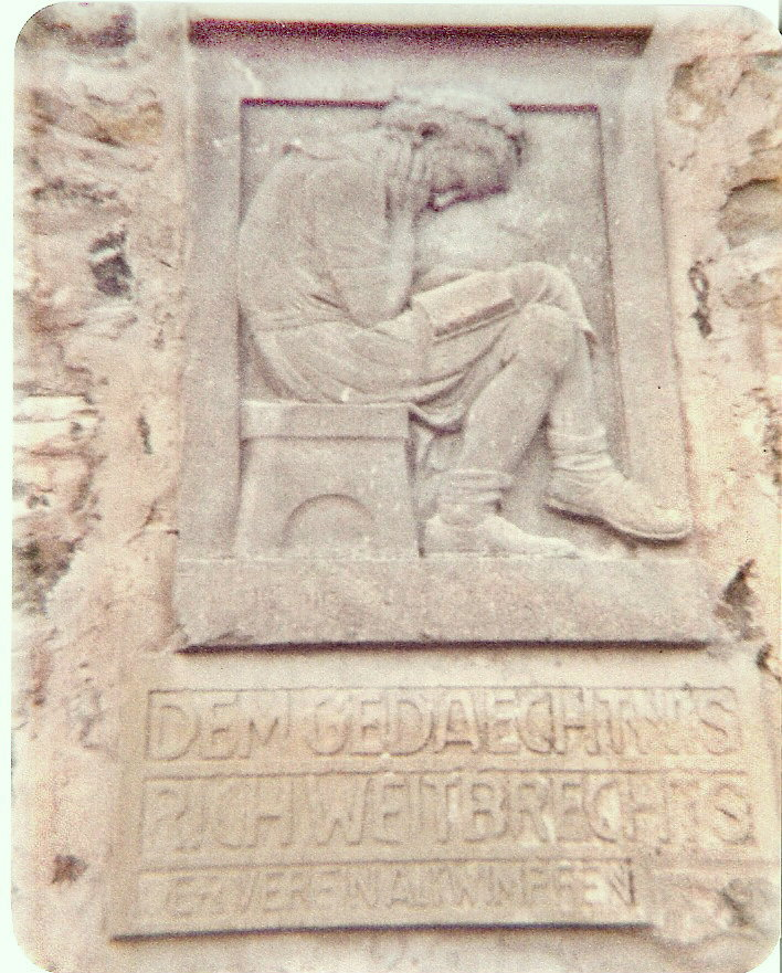 Wandtafel an der Stadtmauer der Pfalz Wimpfen